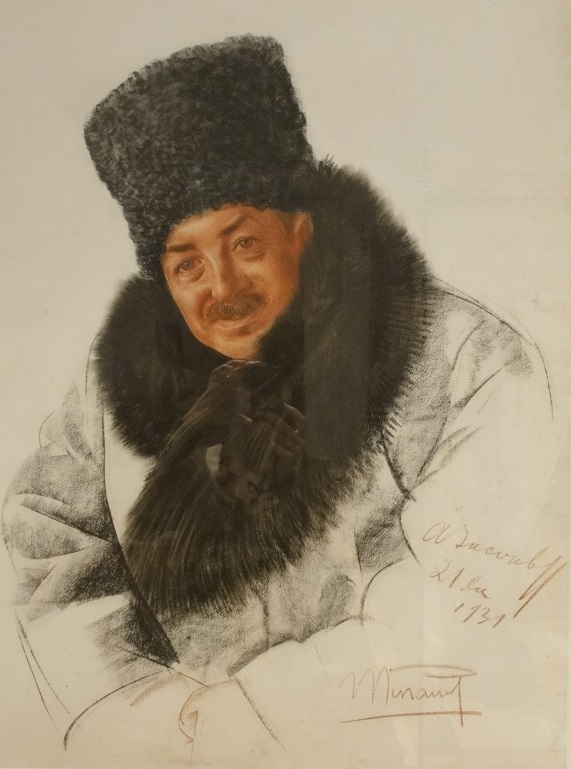 Portrait de Maurice Penaud